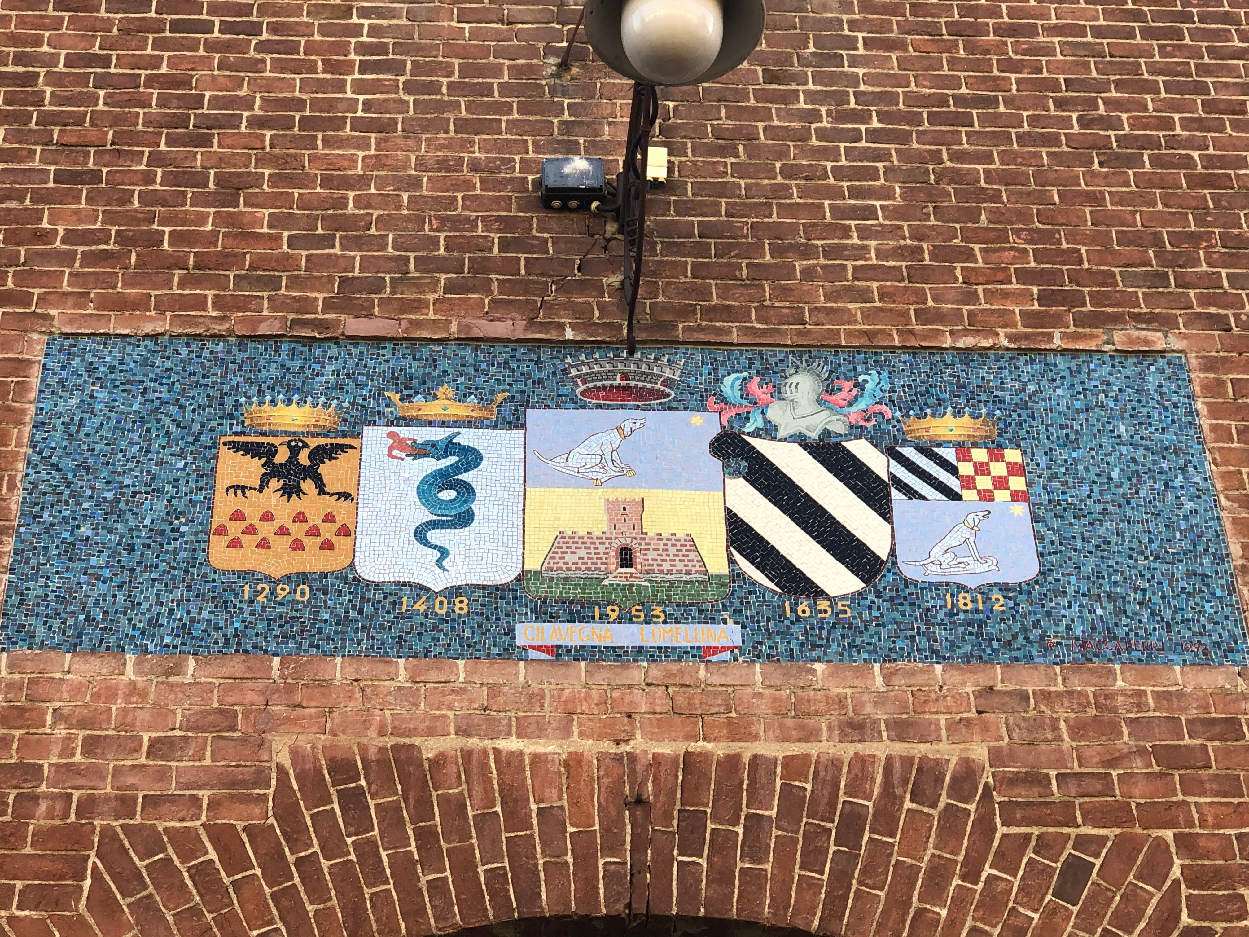 Stemmi di Cilavegna sul torione del castello